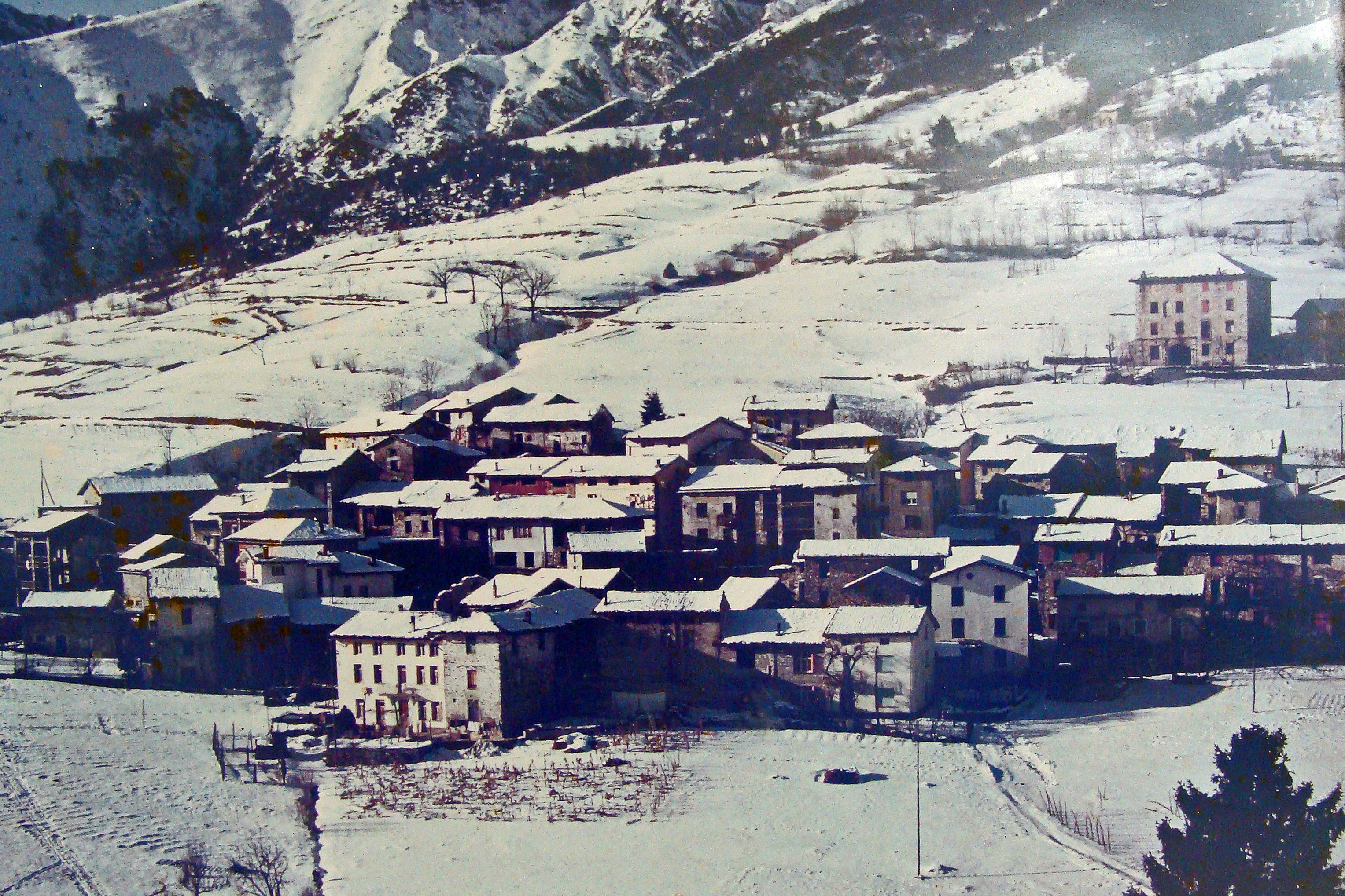 ancienne photographie de Monteaperta (Borgo di Sopra) commune de Taipana, avant le séisme de 1976 et le palazzo Cobai (à droite).